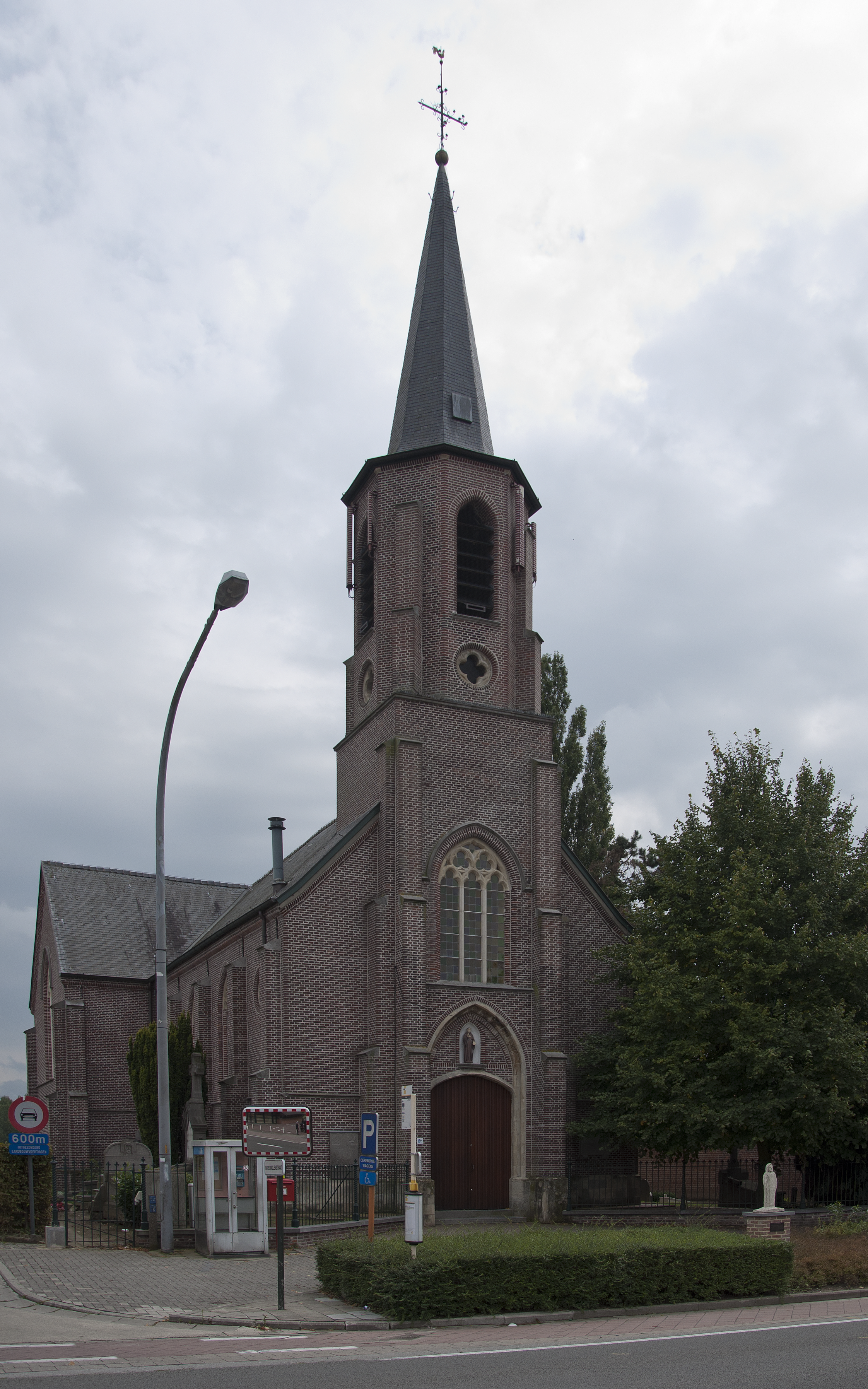 De Sint-Bavokerk te Gontrode, België